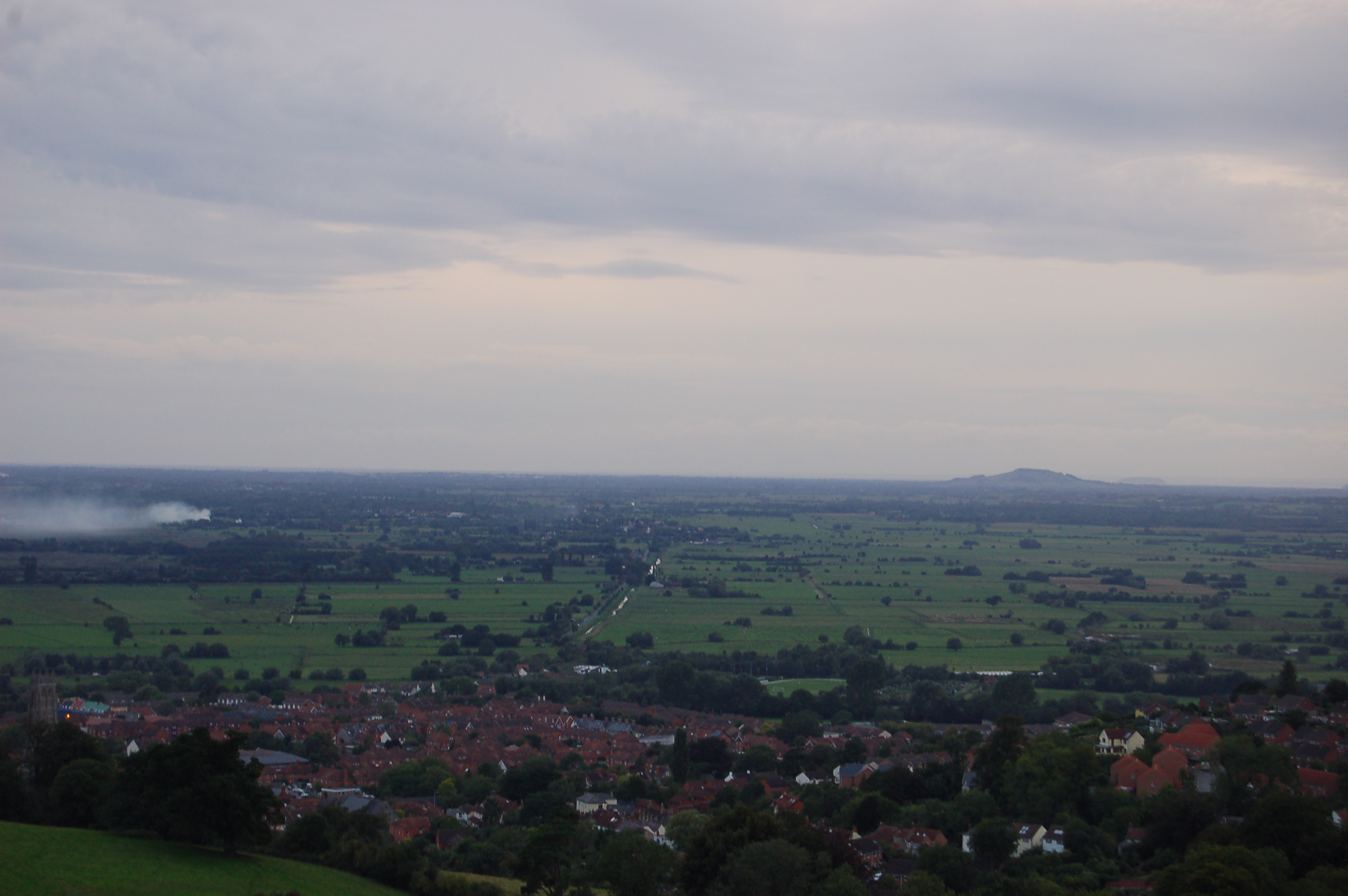 Somerset Levels